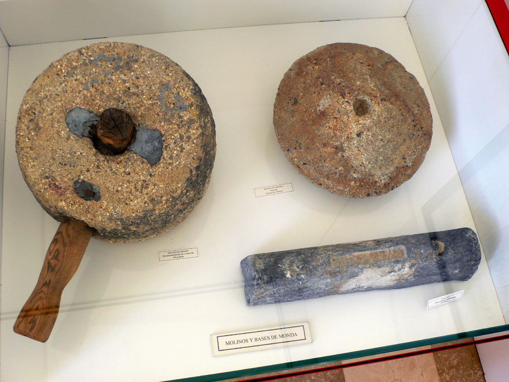 Útiles y lingotes mineros. Museo Arqueológico de Portmán (Región de Murcia)